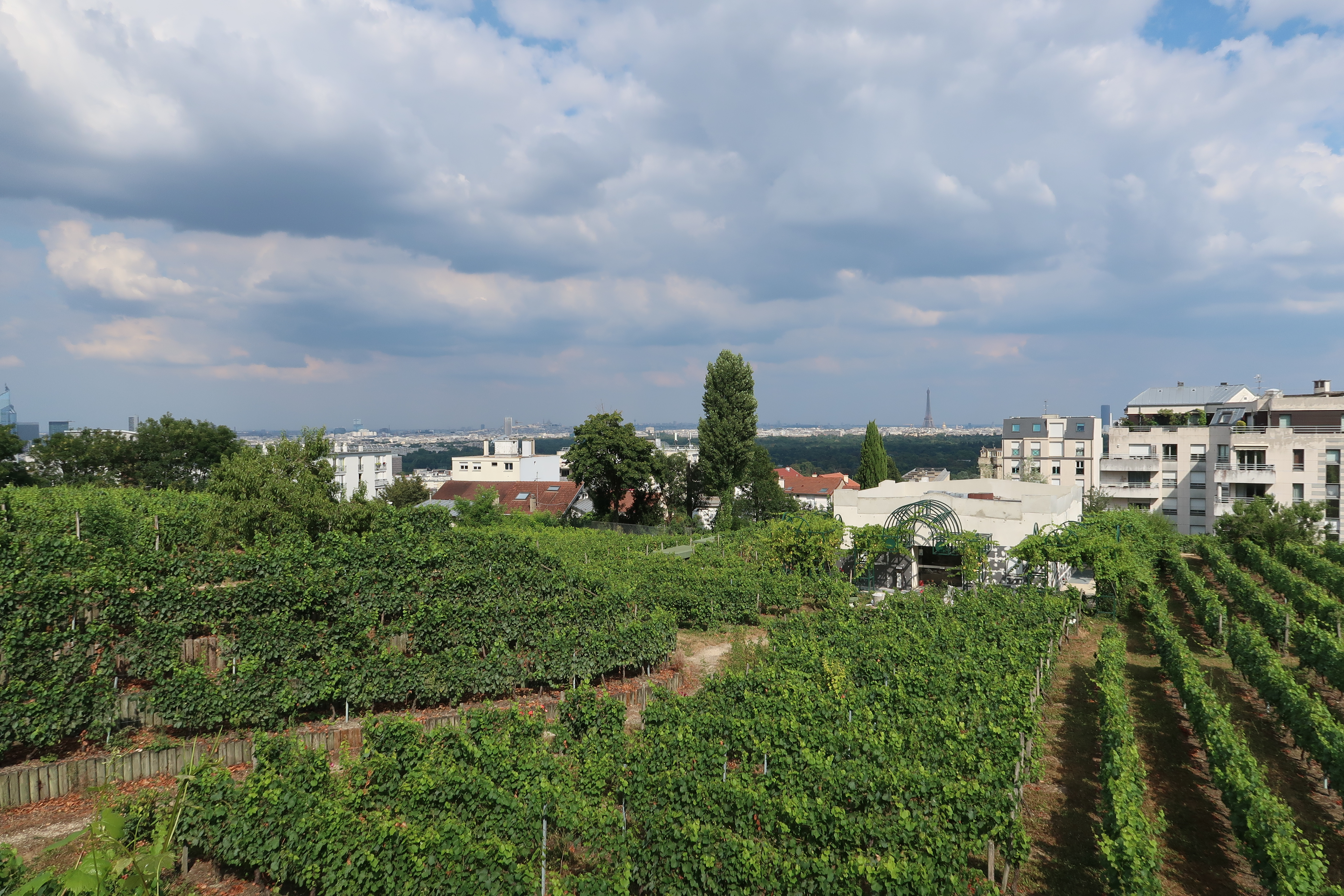 Vigne municipale de Suresnes, 4 rue du Passage Saint-Maurice (Hauts-de-Seine).